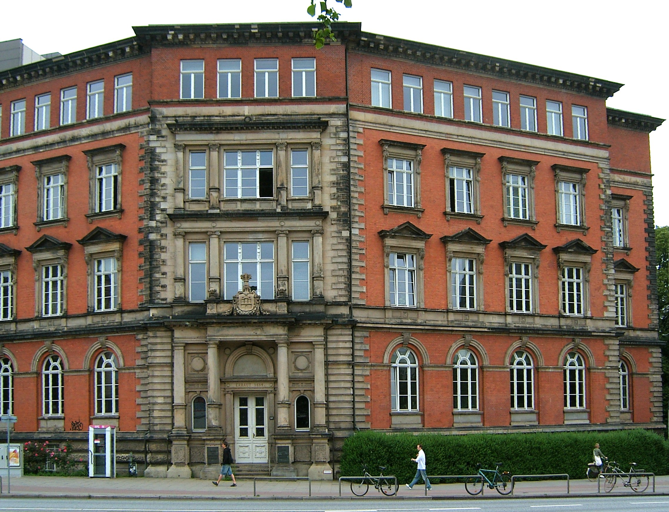 Hamburg, Universitätsbibliothek